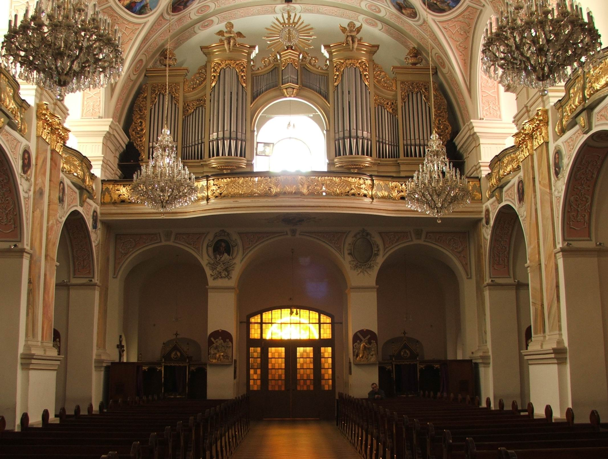 Kosciół‚ w Pszowie, archidiecezja katowicka